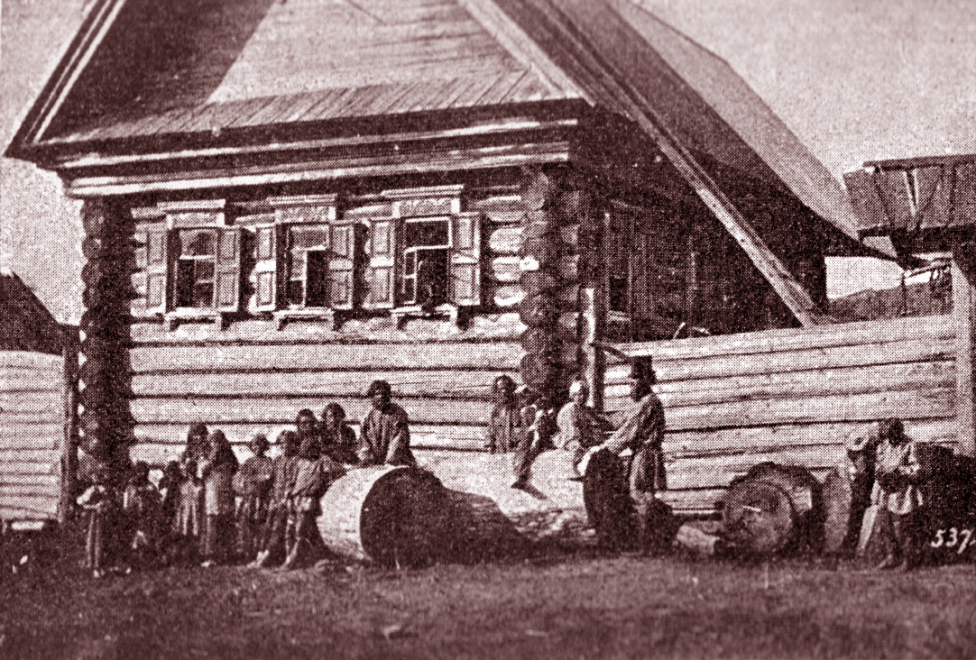 Russian Village